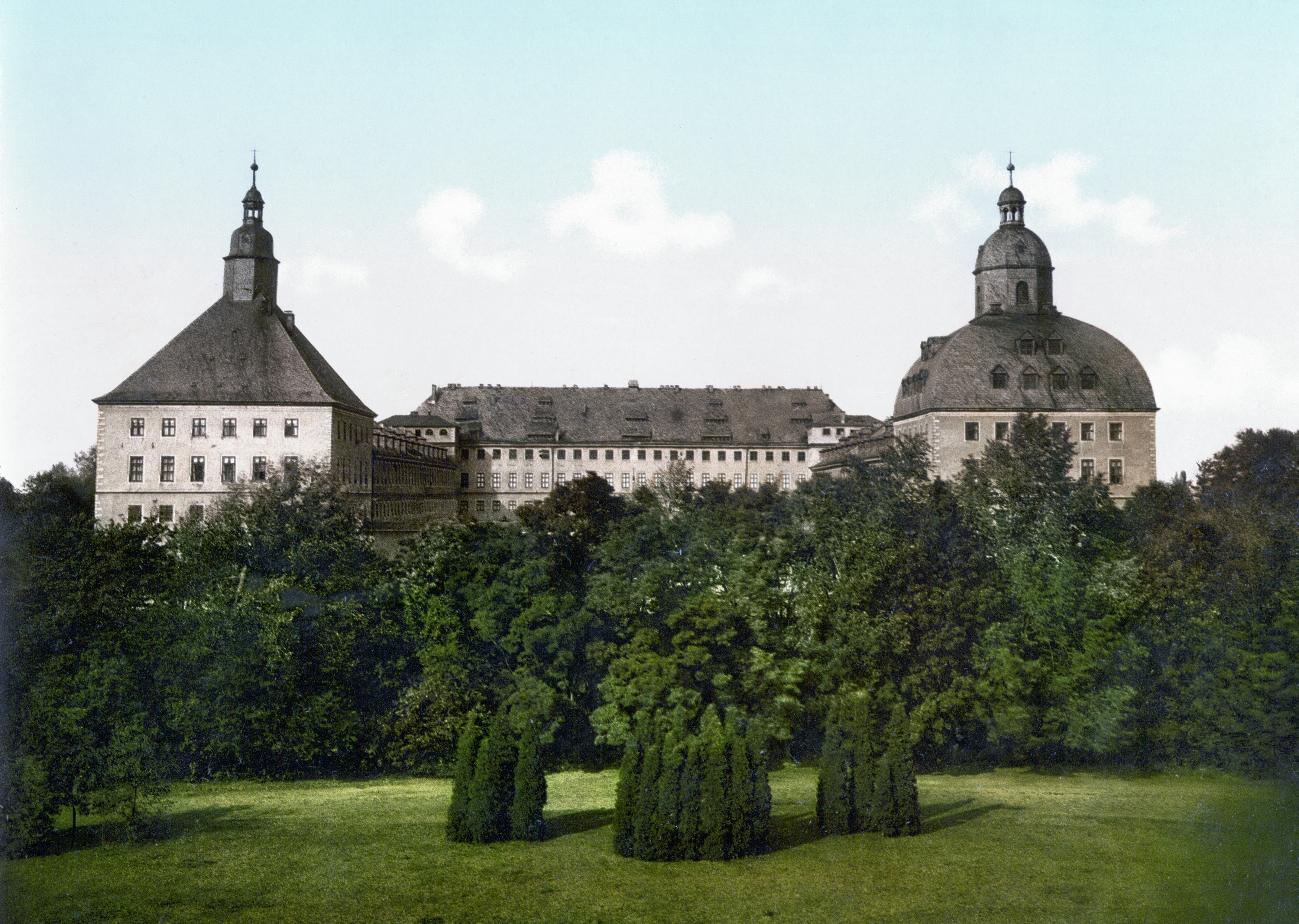 Gotha Schloss um 1900